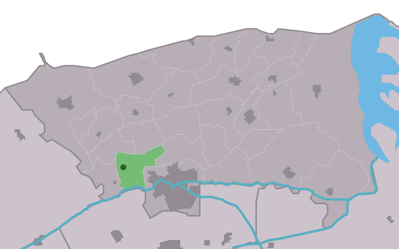 Kaartsje fan himrik fan Boarnwert